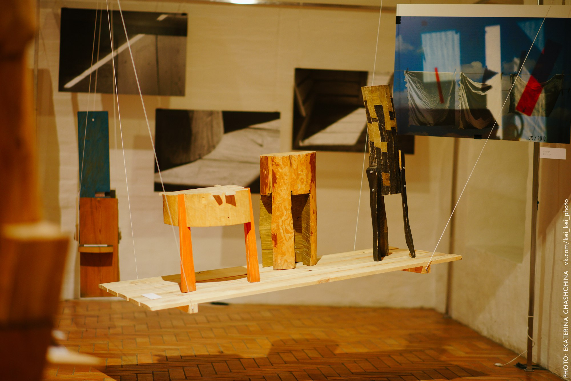 Arctic Art Forum 2017. Выставка “Дом Света”. Мастерская ТАФ. Архангельский краеведческий музей.